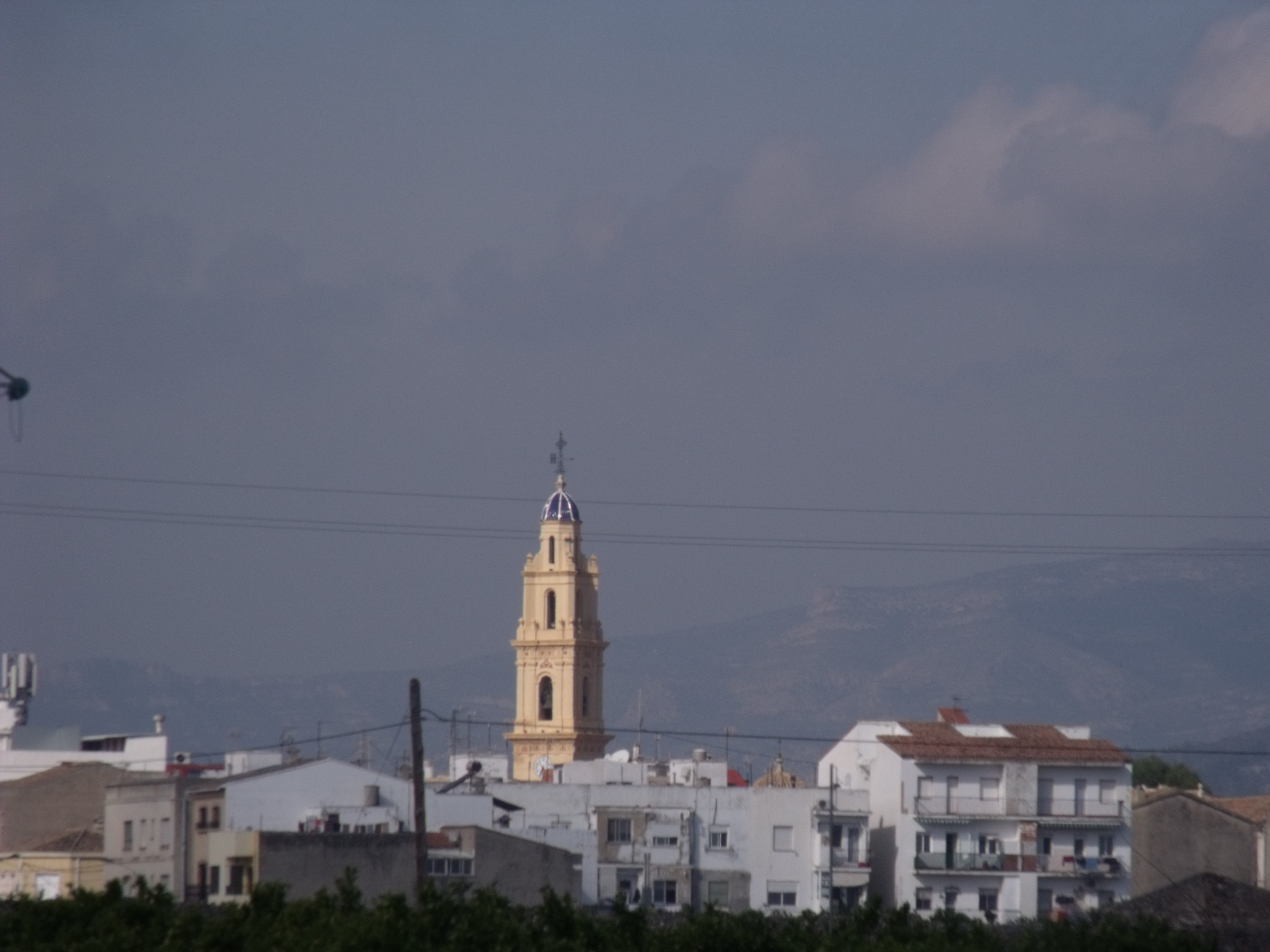 Vista general del pueblo